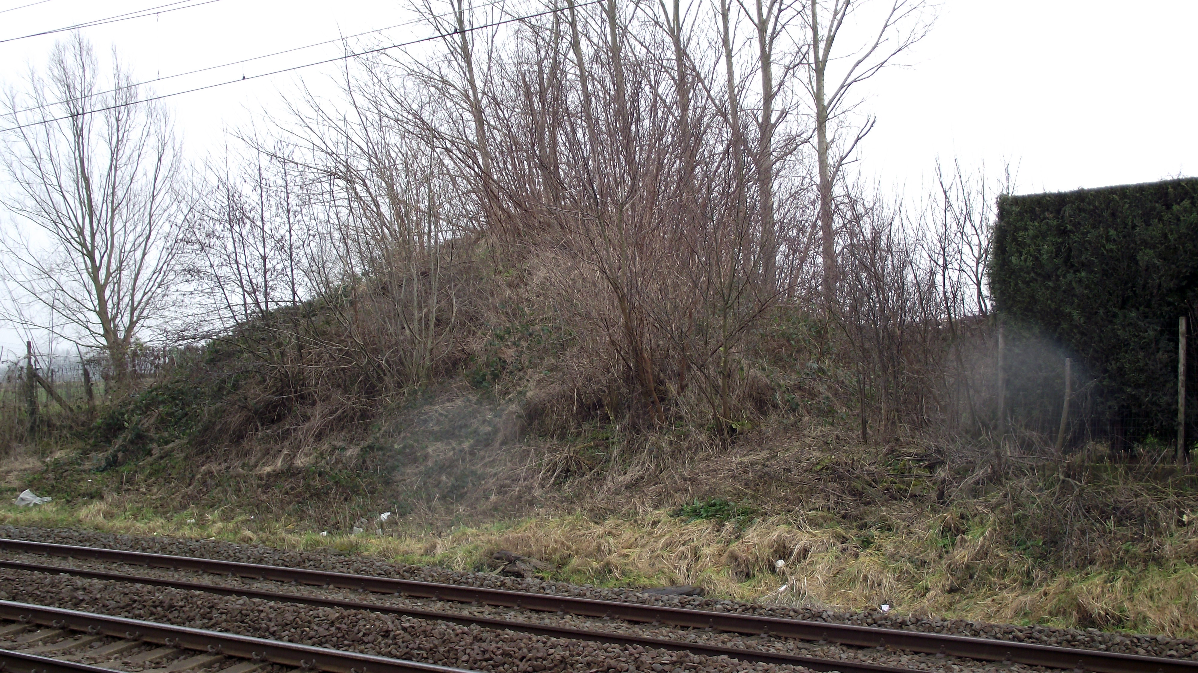 De vroegere talud voor de brug van de buurtspoorlijn over het spoor in Herzele.